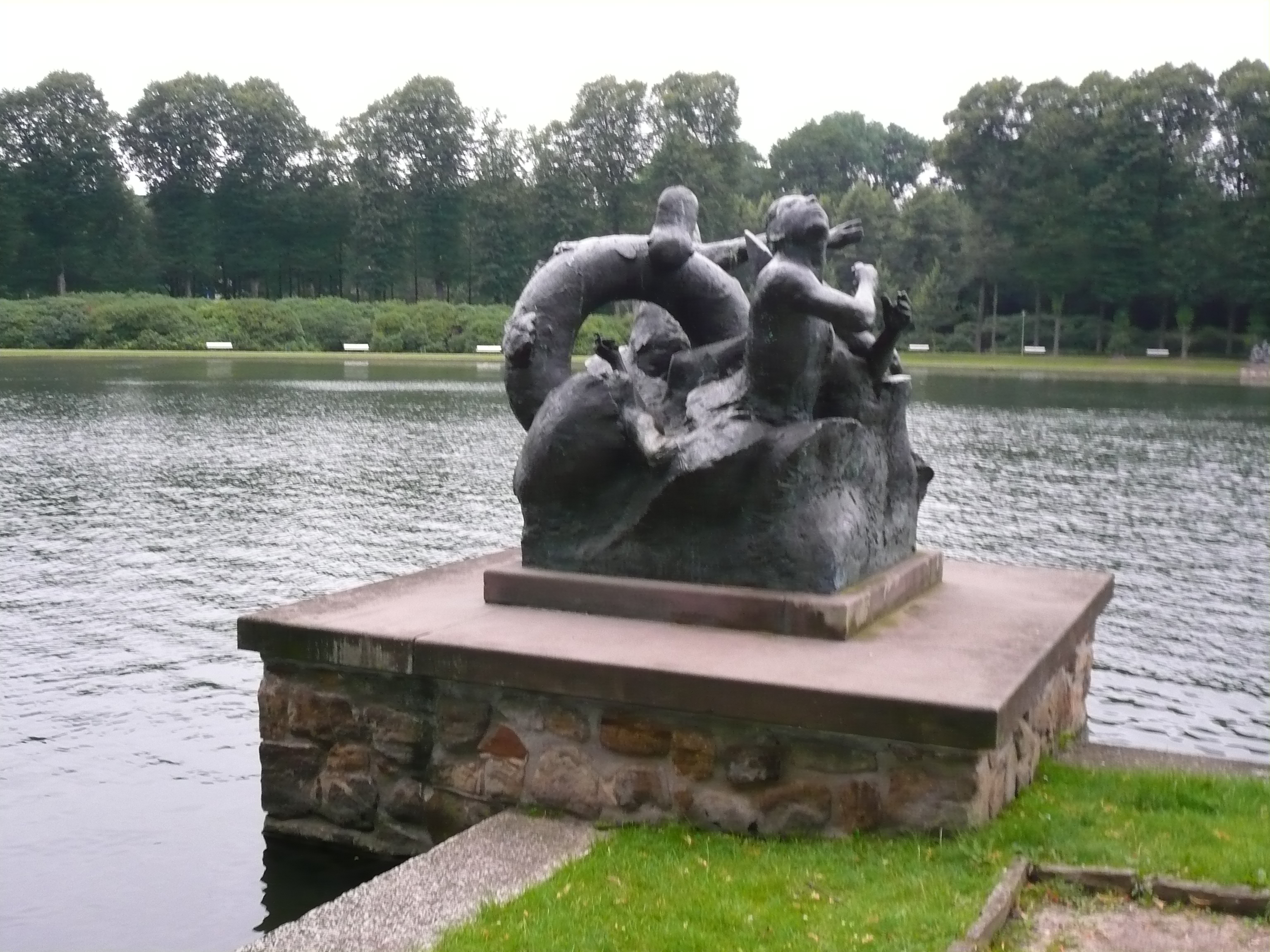 Skulptur am Hollersee in Bremen